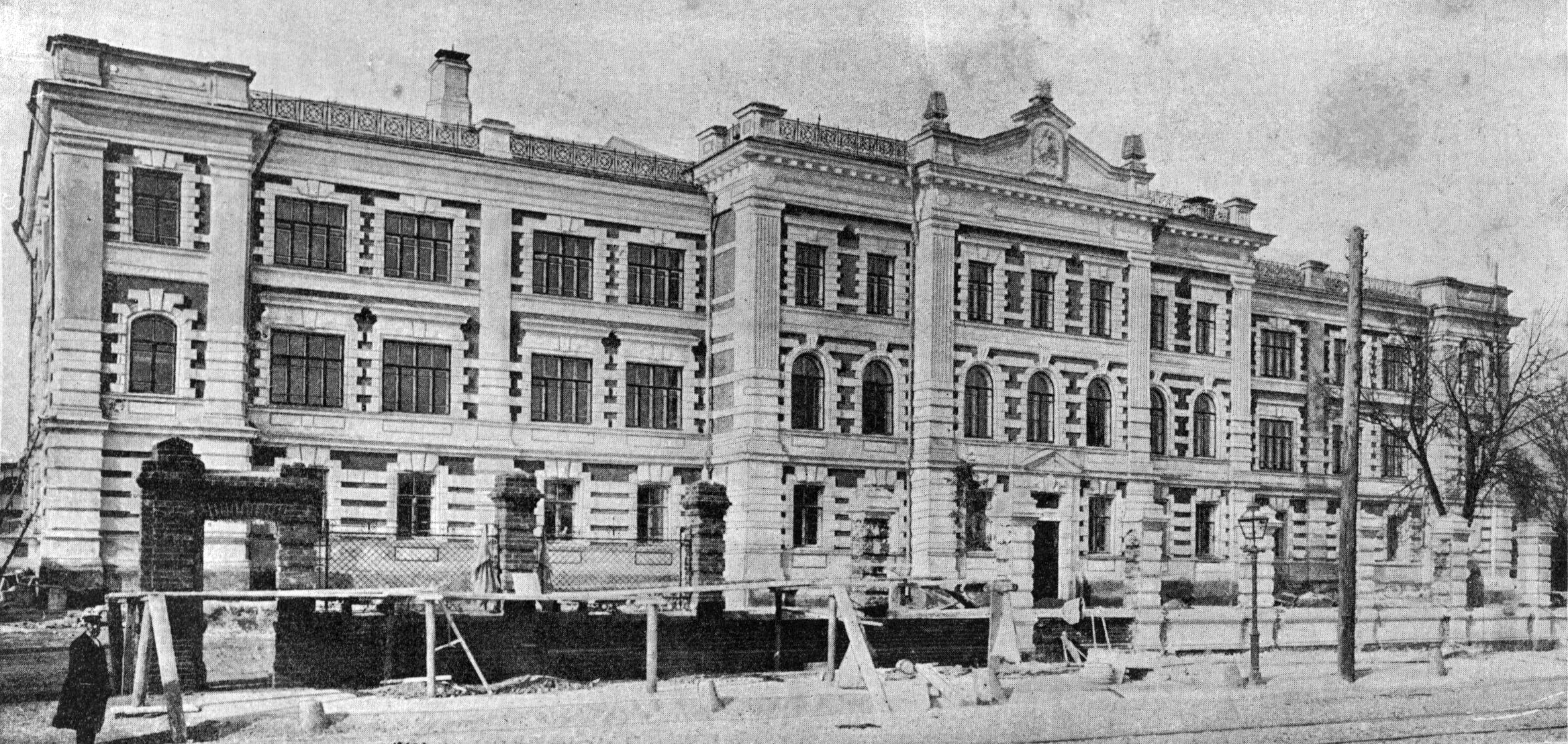 Реальное училище на Садовой улице, освященное 1 октября 1901 года (по ст. стилю)